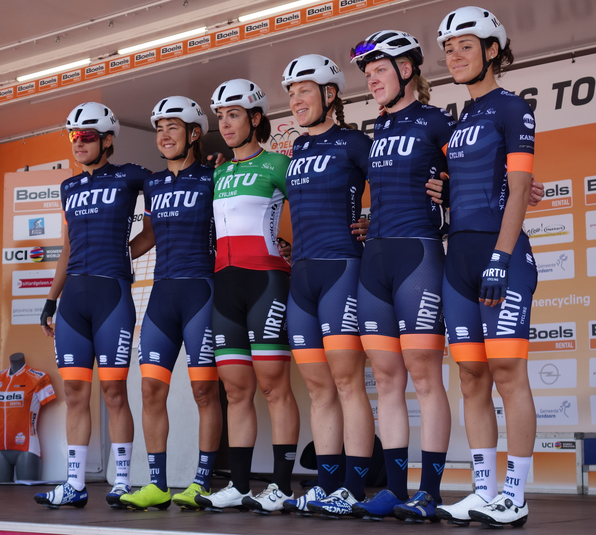 Team Virtu bij de start van de eerste etappe van Stramproy naar Weert in de Boels Ladies Tour 2019